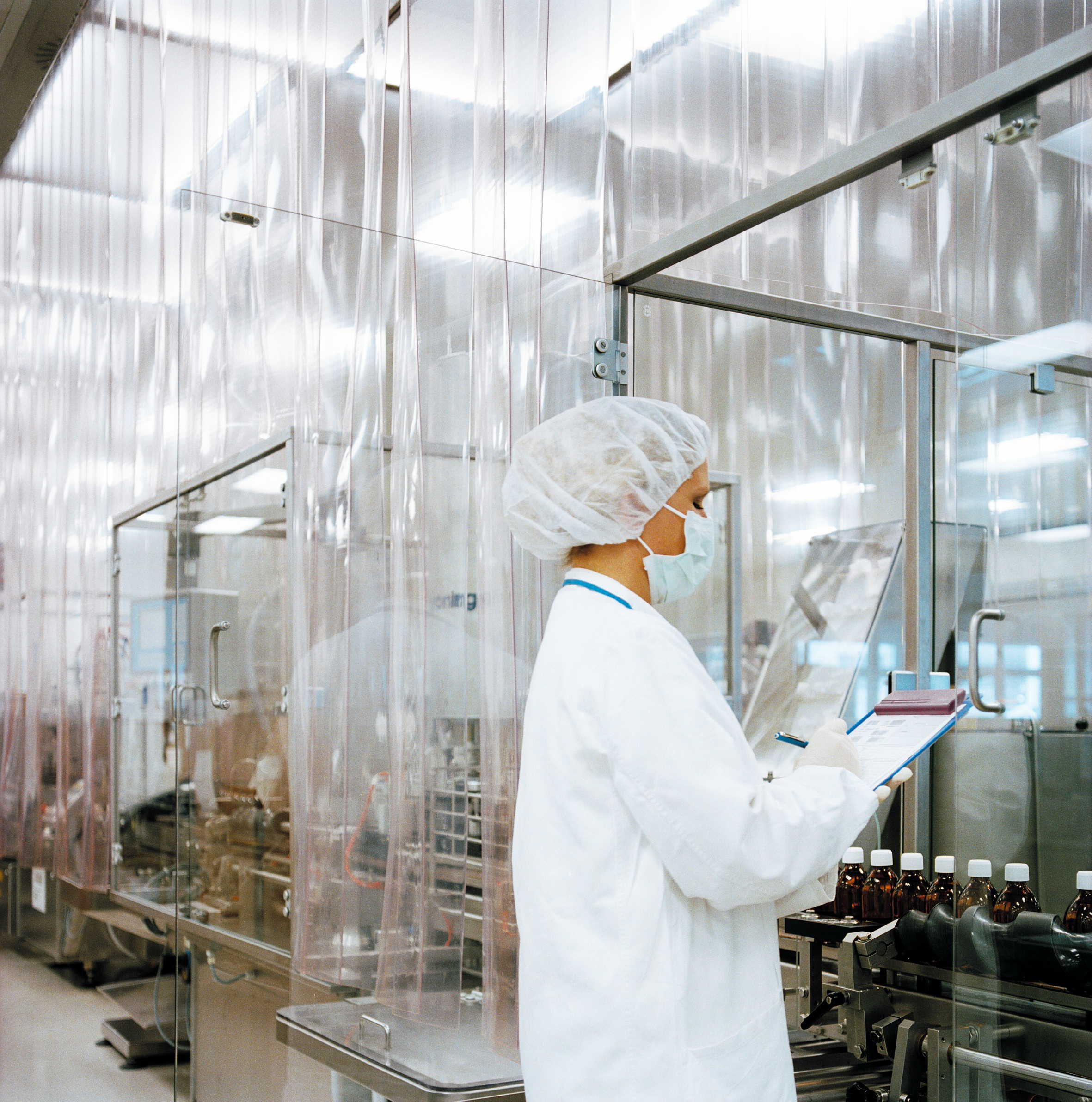 ratiopharm verfügt über Produktionsstandorte in Ulm und Blaubeuren-Weiler. 2011 wurden circa zehn Milliarden Tabletten, drei Millionen Liter flüssige Arzneimittel und 1.000 Tonnen Salben produziert; darüber hinaus 165 Millionen Einheiten sterile Arzneimittel.